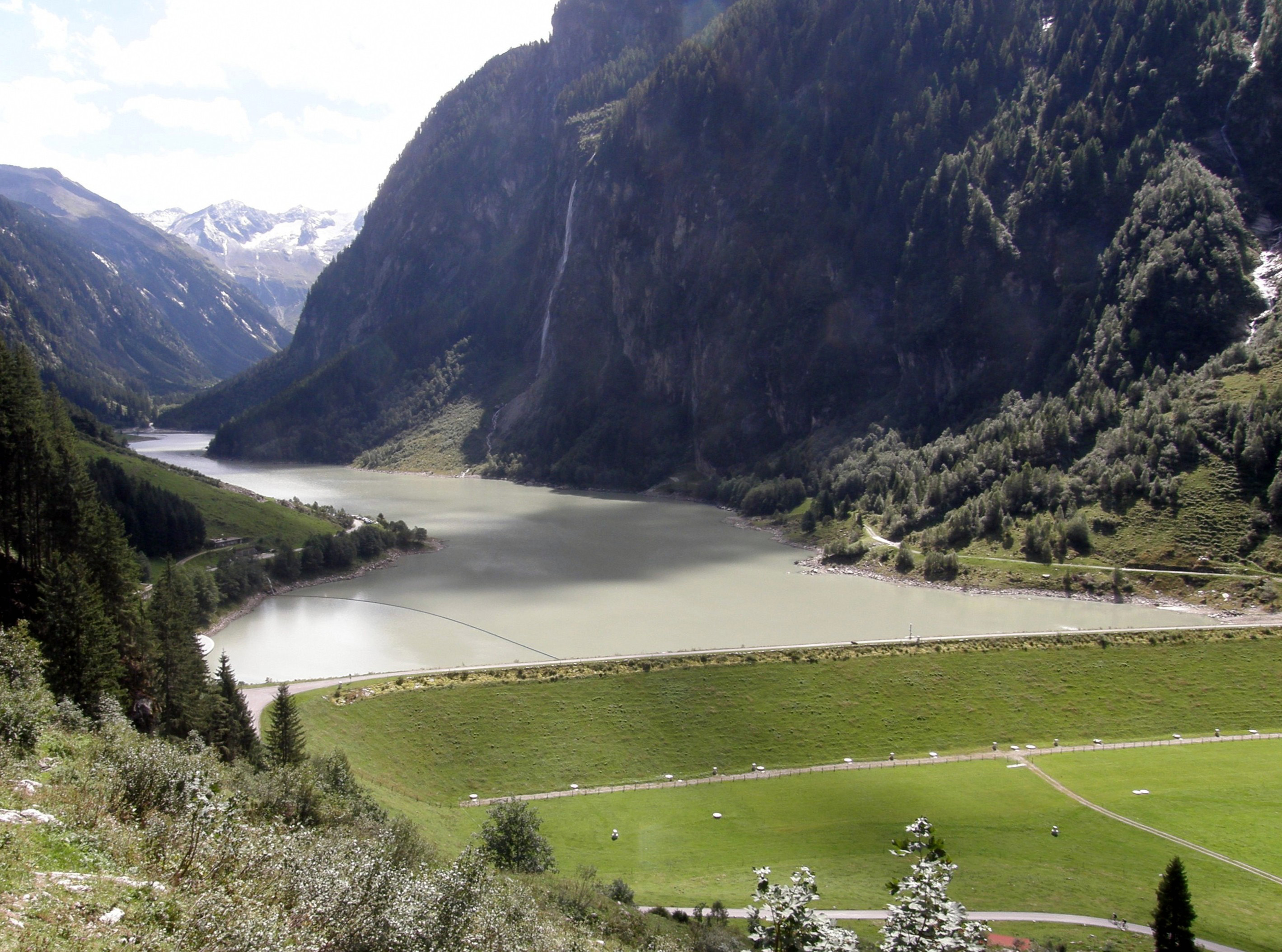 Speicher Stillupp im Stillupptal in den Zillertaler Alpen (Tirol, Österreich)